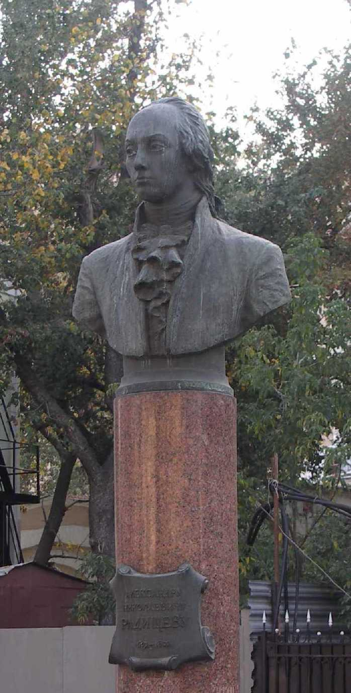 Alexander Radischev_state in Moscow.jpg